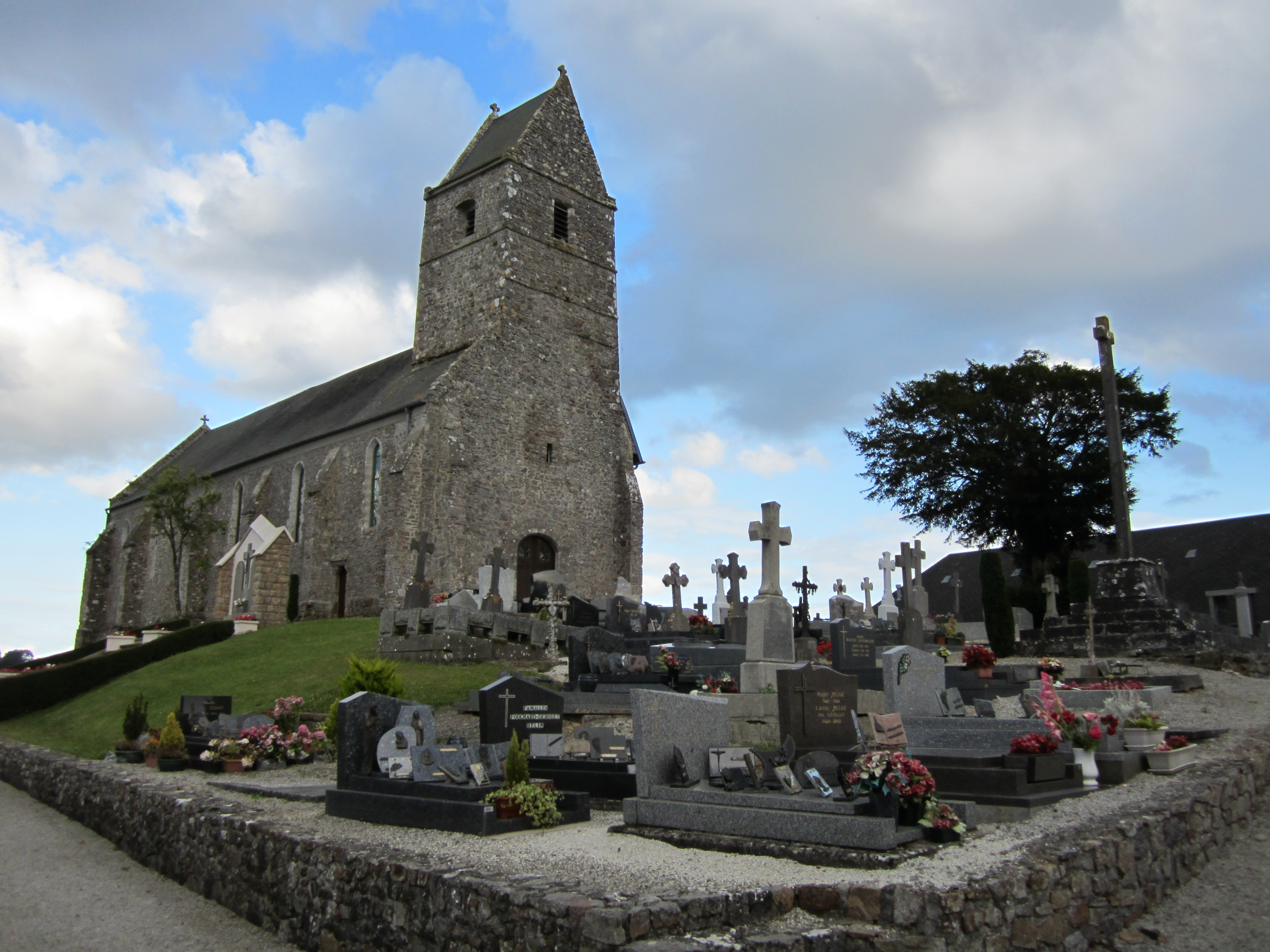 église Saint-Jean-Baptiste d'Hyenville